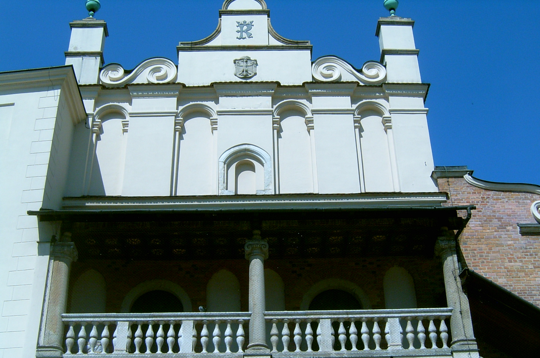 Kraków, Poland